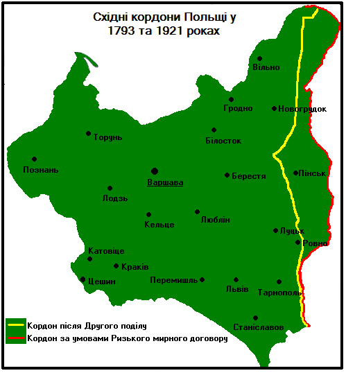 Кордони Польщі 1973 (Другий поділ Речі Посполитої) та 1921 року